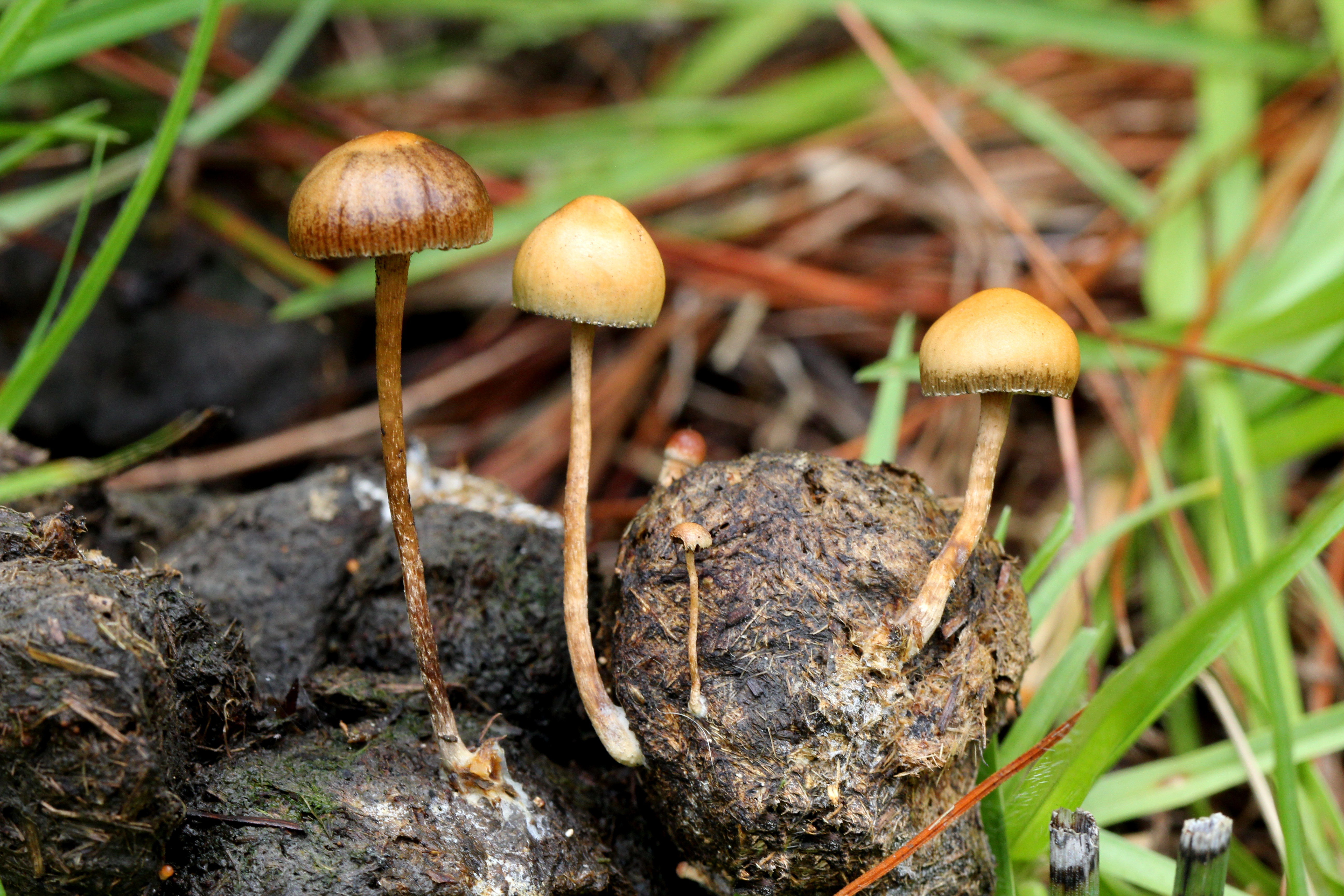 Deconica coprophila (Bull.) Fr.